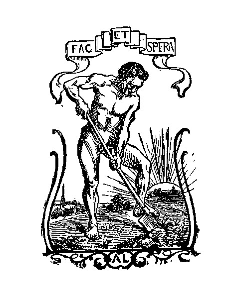 Marque Alphonse Lemerre (Fac et spera) sur le 3e Parnasse contemporain